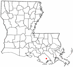 Volapük: Topam in tat: Louisiana.